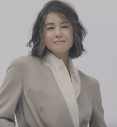 오래 기다리셨어요. '우먼센스' 9월호의 표지를 장식한 배우 김지호의 촬영 스케치 동영상을 공개합니다. 이 날의 이야기는 '우먼센스' 9월호와 홈페이지에서 확인할 수 있답니다.